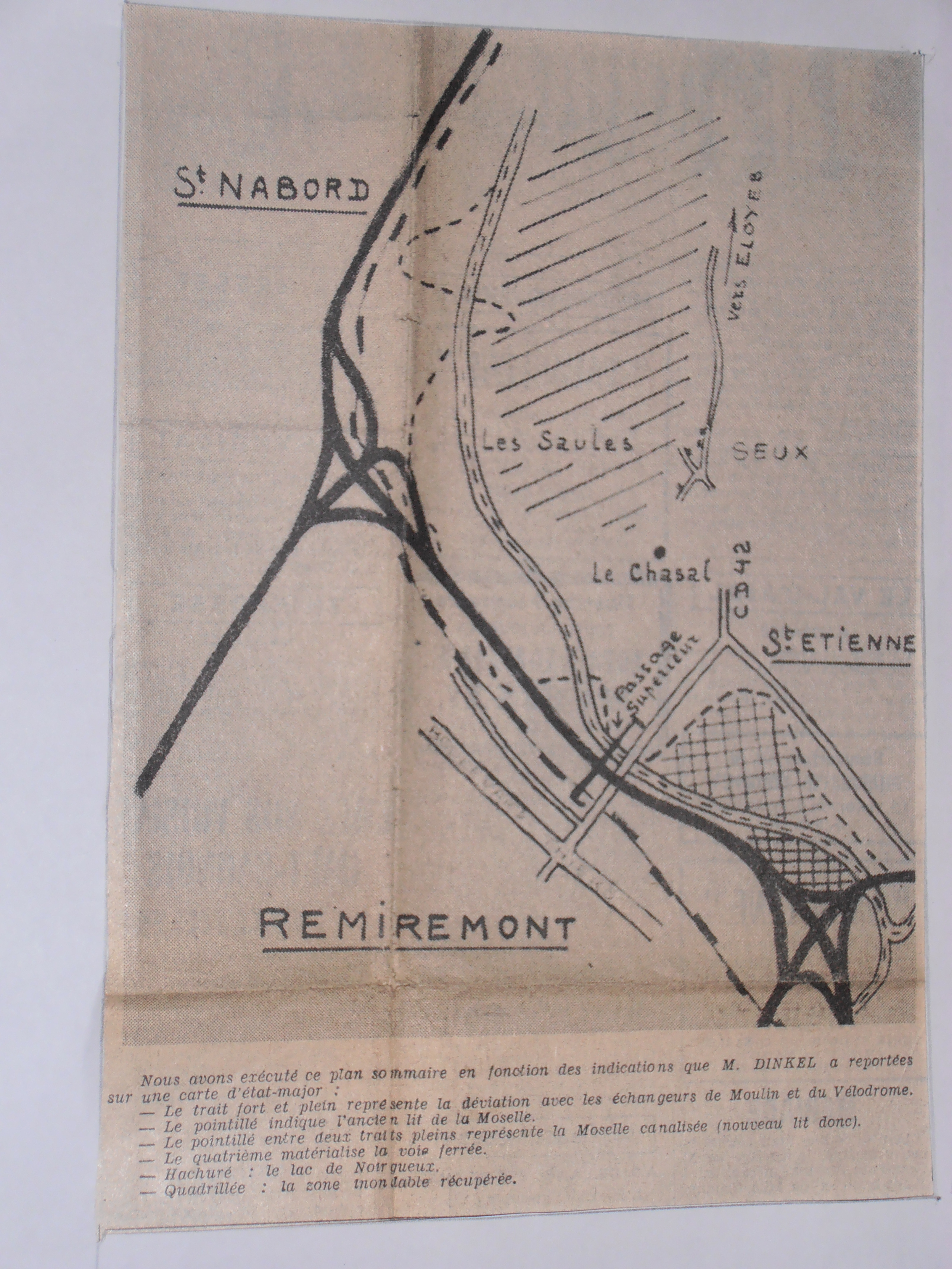 Département des Vosges, « Plan d’eau de Noirgueux », Parc nautique de Remiremont, Plan sommaire exécuté par le quotidien « La Liberté de l’Est », en fonction des indications que Gérard Dinkel ingénieur a reportées sur une carte d’état-major, en complément des études de l’Agence financière de Bassin Rhin-Meuse et de l’Office départemental du tourisme des Vosges. Légende indiquée par le quotidien « La Liberté de l’Est » : le trait fort et plein représente la déviation avec les échangeurs de Moulin et du Vélodrome. Le pointillé indique l'ancien lit de la Moselle. Le pointillé deux traits pleins représente la Moselle canalisée (nouveau lit donc). Le quatrième matérialise la voie ferrée. Hachuré : le lac de Noirgueux. Quadrillée : la zone inondable.